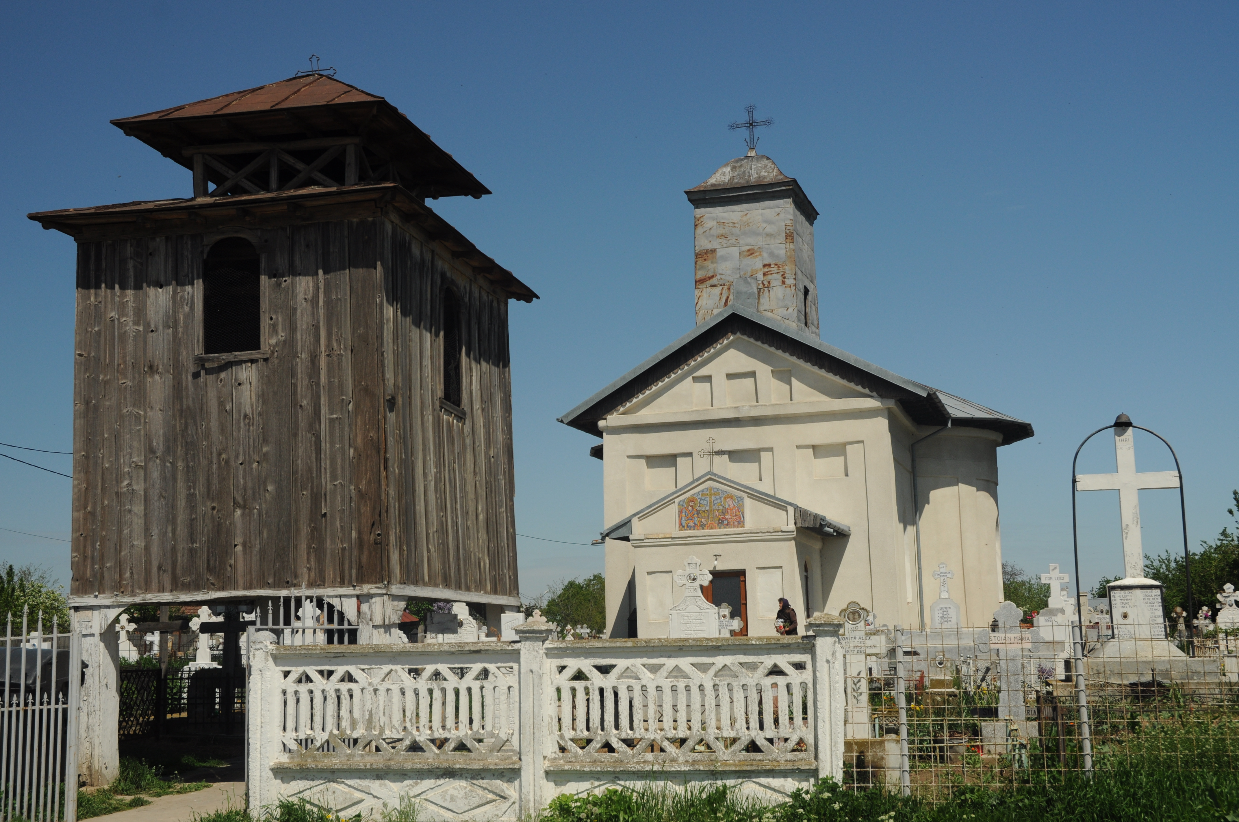 Biserica "Sf. Împărați Constantin și Elena"